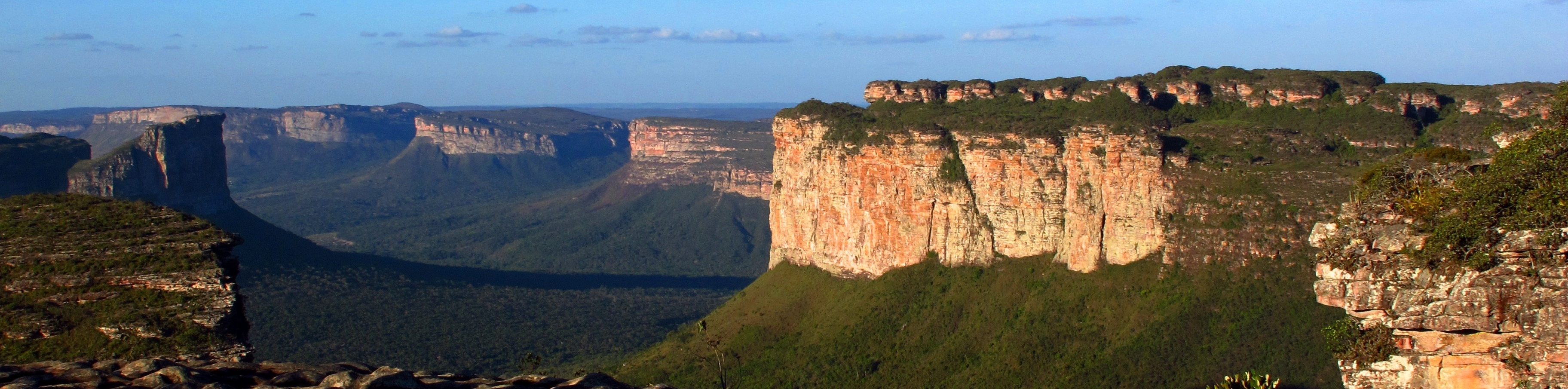 Chapada Diamantina a partir do Morro do Pai Inácio, Bahia, Brasil.